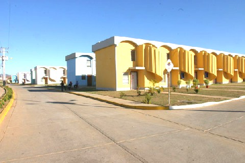 Residencias de la UDS